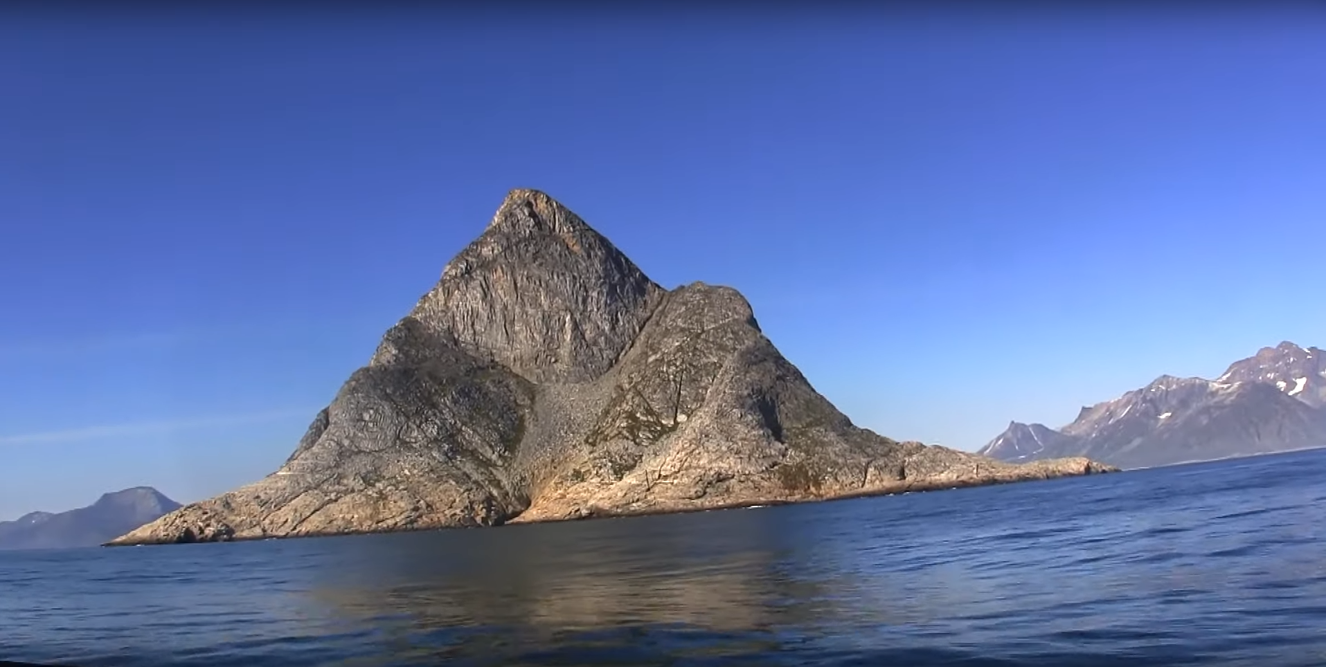 isla de Arsuup Uummannaa